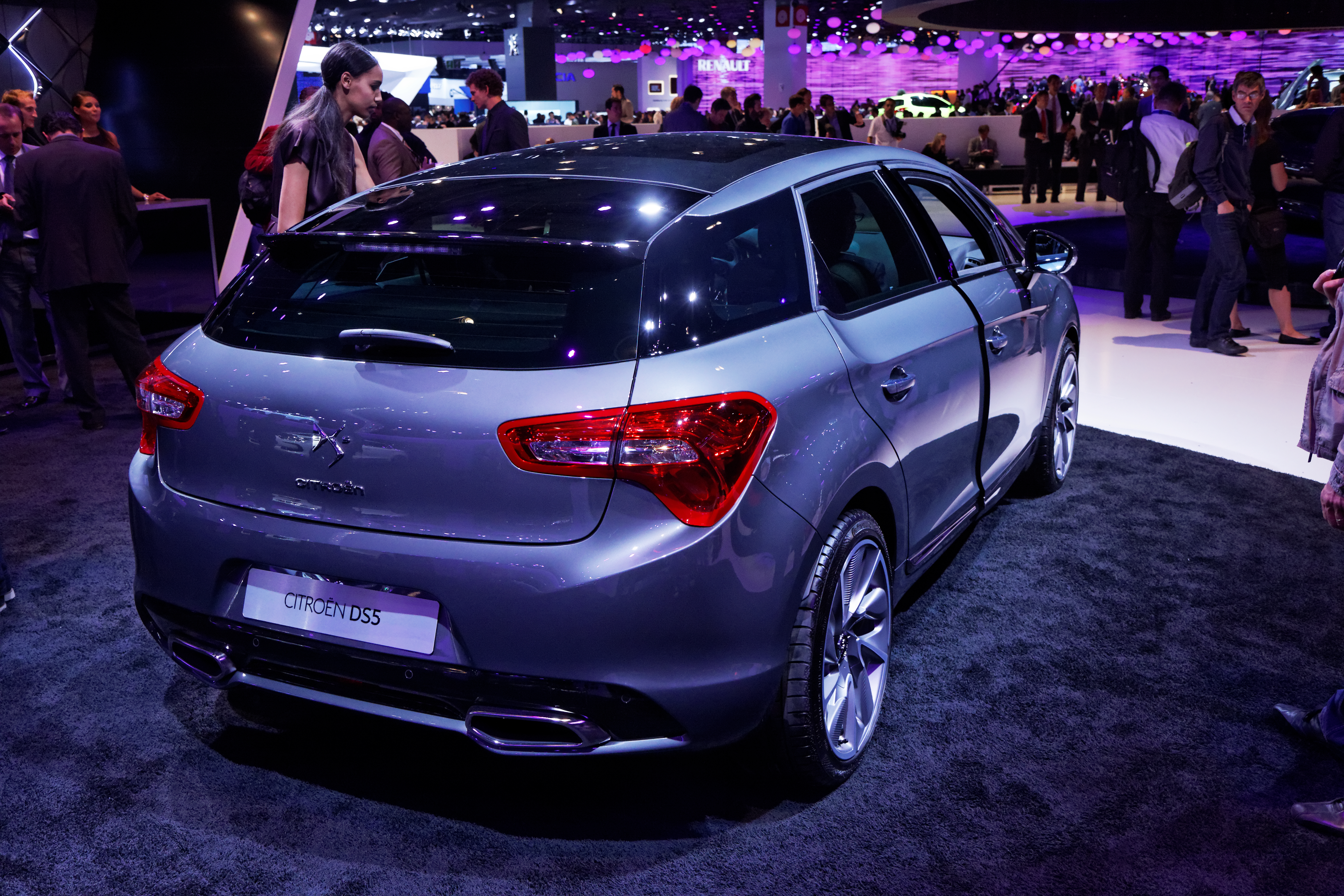 Une Citroën DS5 présentée lors du Mondial de l'Automobile de Paris 2012.